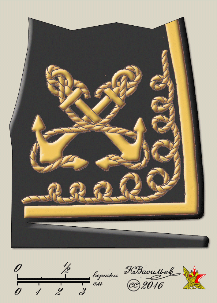 Российская империя Добровольный флот Шитьё на воротнике мундира Добровольного флота образца 1899г. Источники: 1. Полное собрание законов Российской Империи, собр.3,т.19, №16753 от 31 апреля 1899г. 2. Полное собрание законов Российской Империи, собр.3,т.19, №17532 от 31 августа 1899г. 3. "Петербургский коллекционер" №3(95) 2016г. стр.53...55..